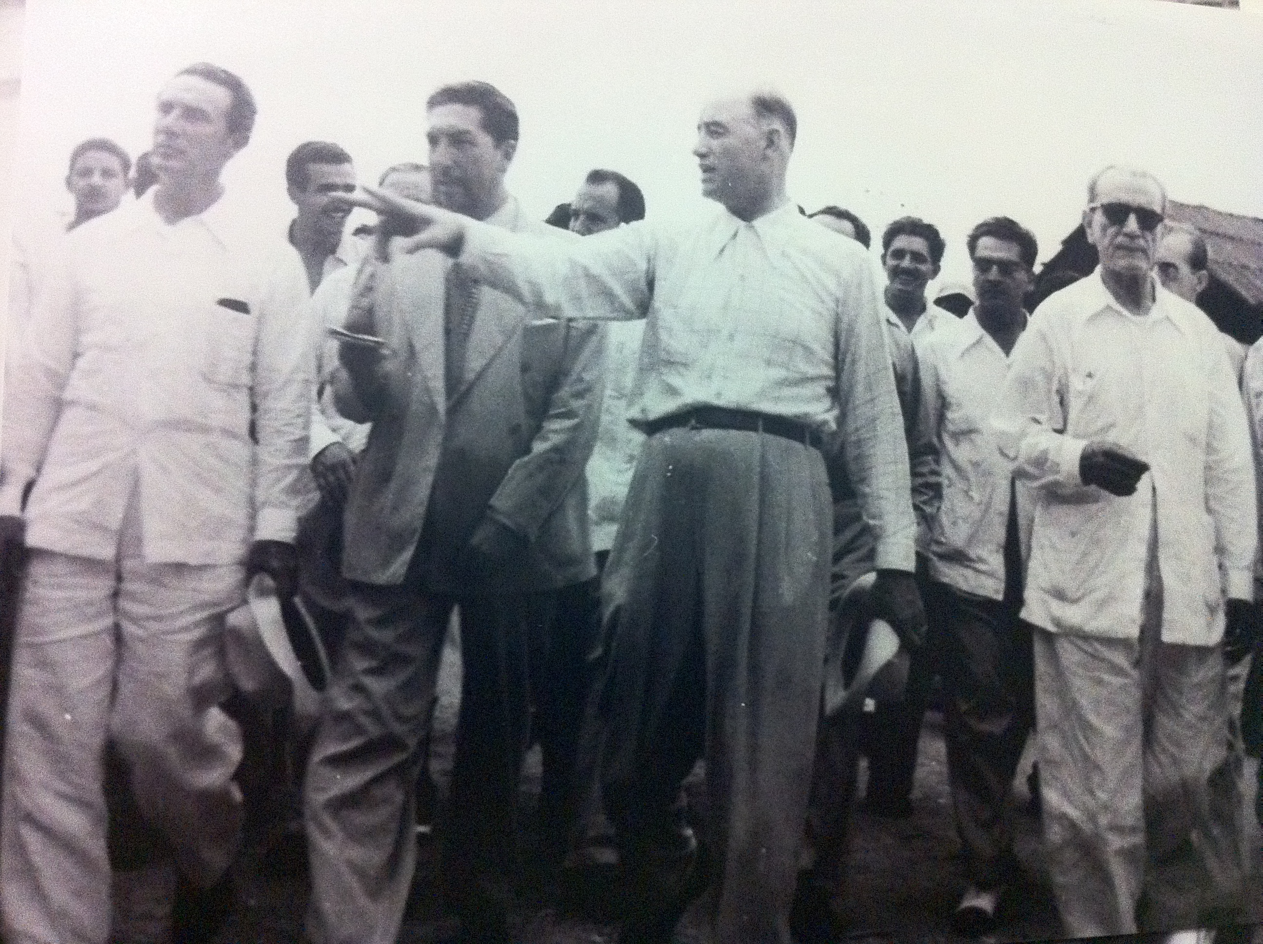 Manuel Suarez